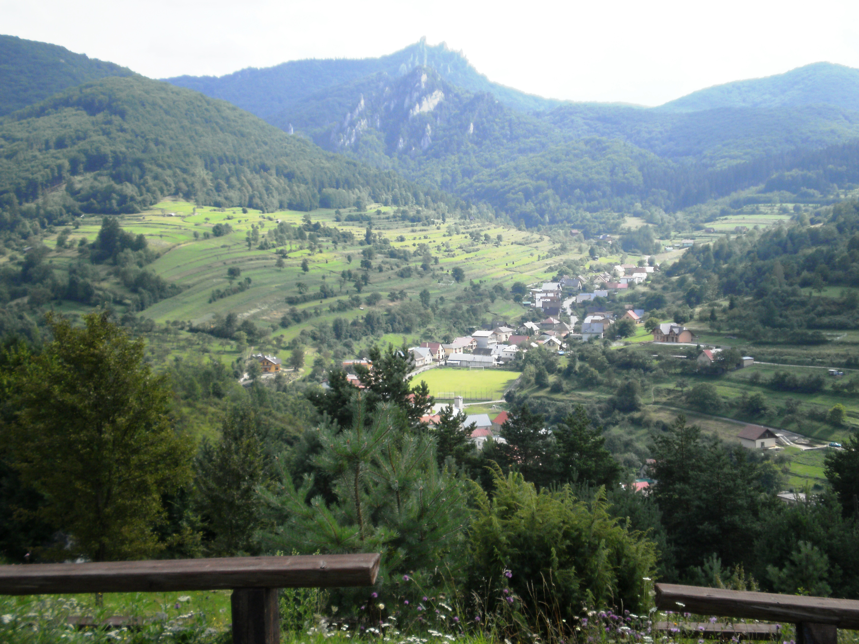 Výhľad na Súľovské skaly